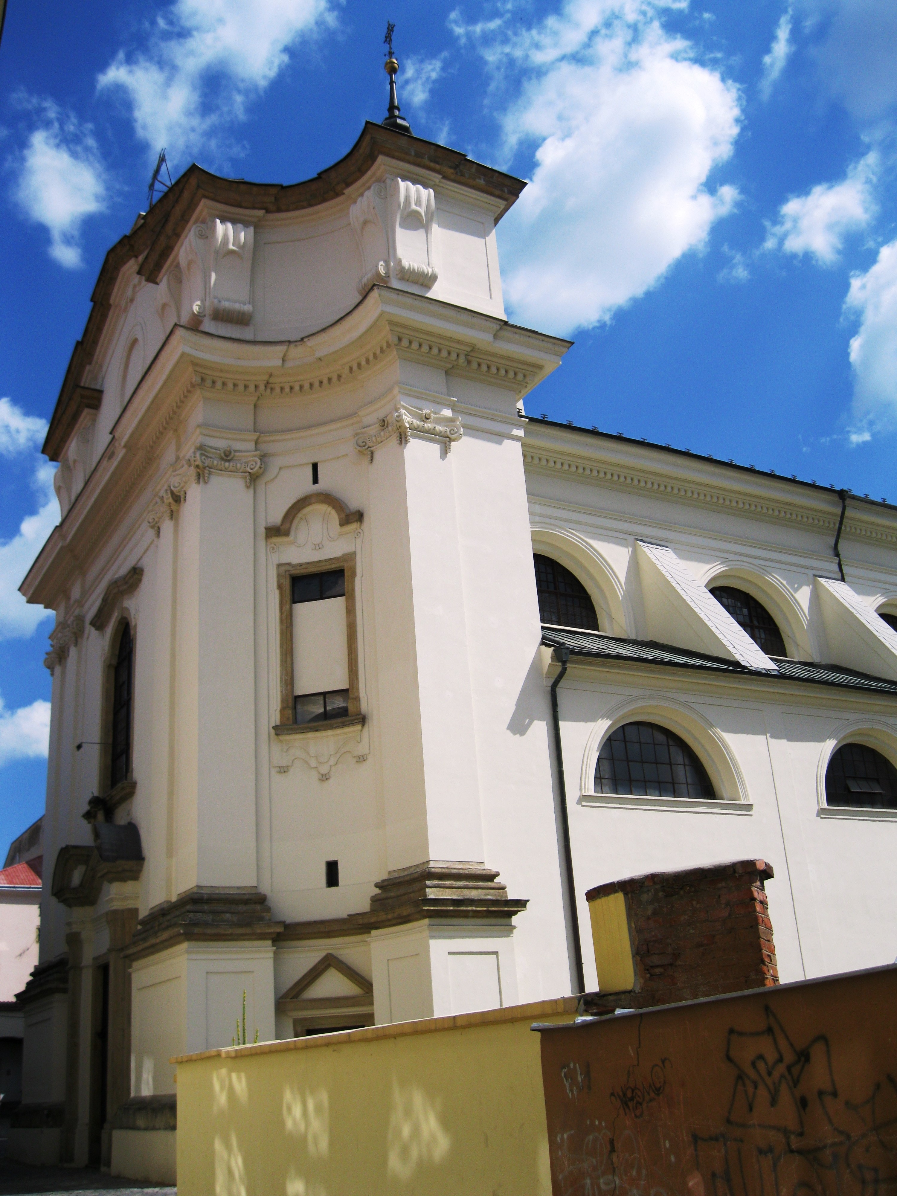 Kostel Nanebevzetí P. Marie (Moravská Třebová), Kostelní nám., Moravská Třebová